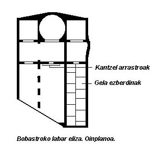 Esglésis mossàrab de Bobastro